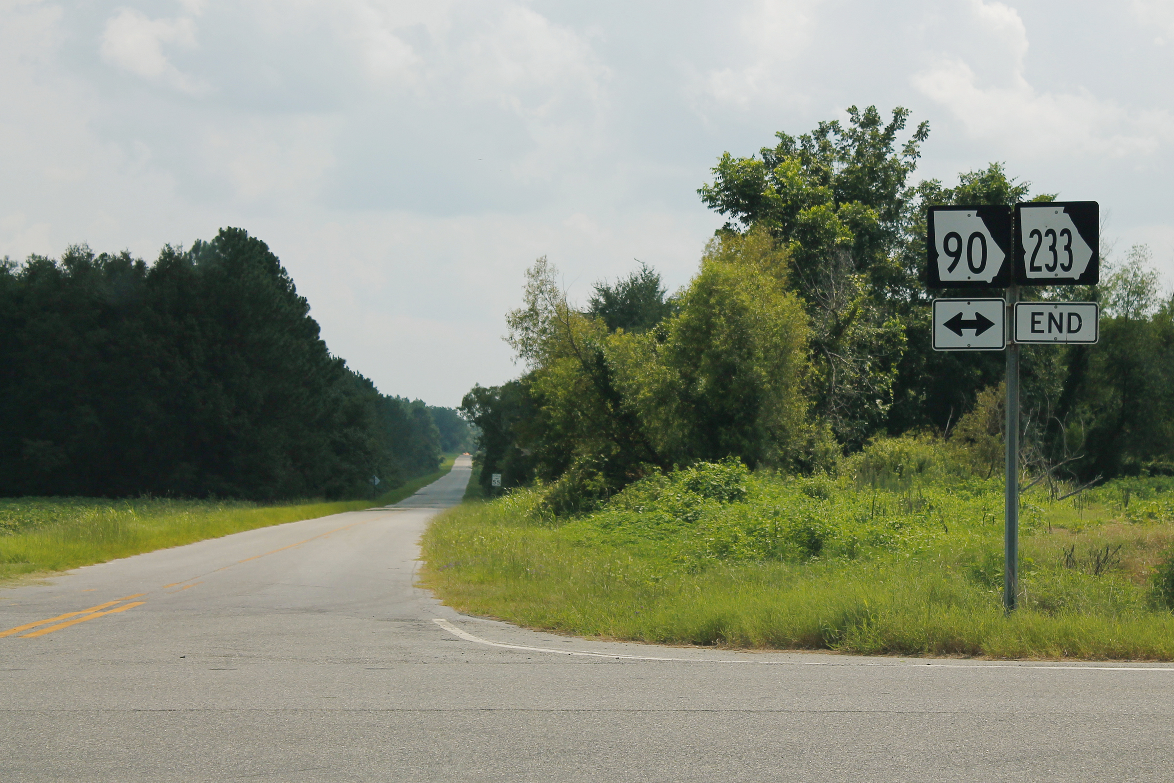 GA233EndSign-GA90ew